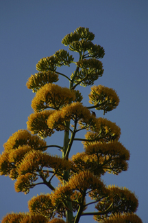 Foto: Andreas Gronski 2002